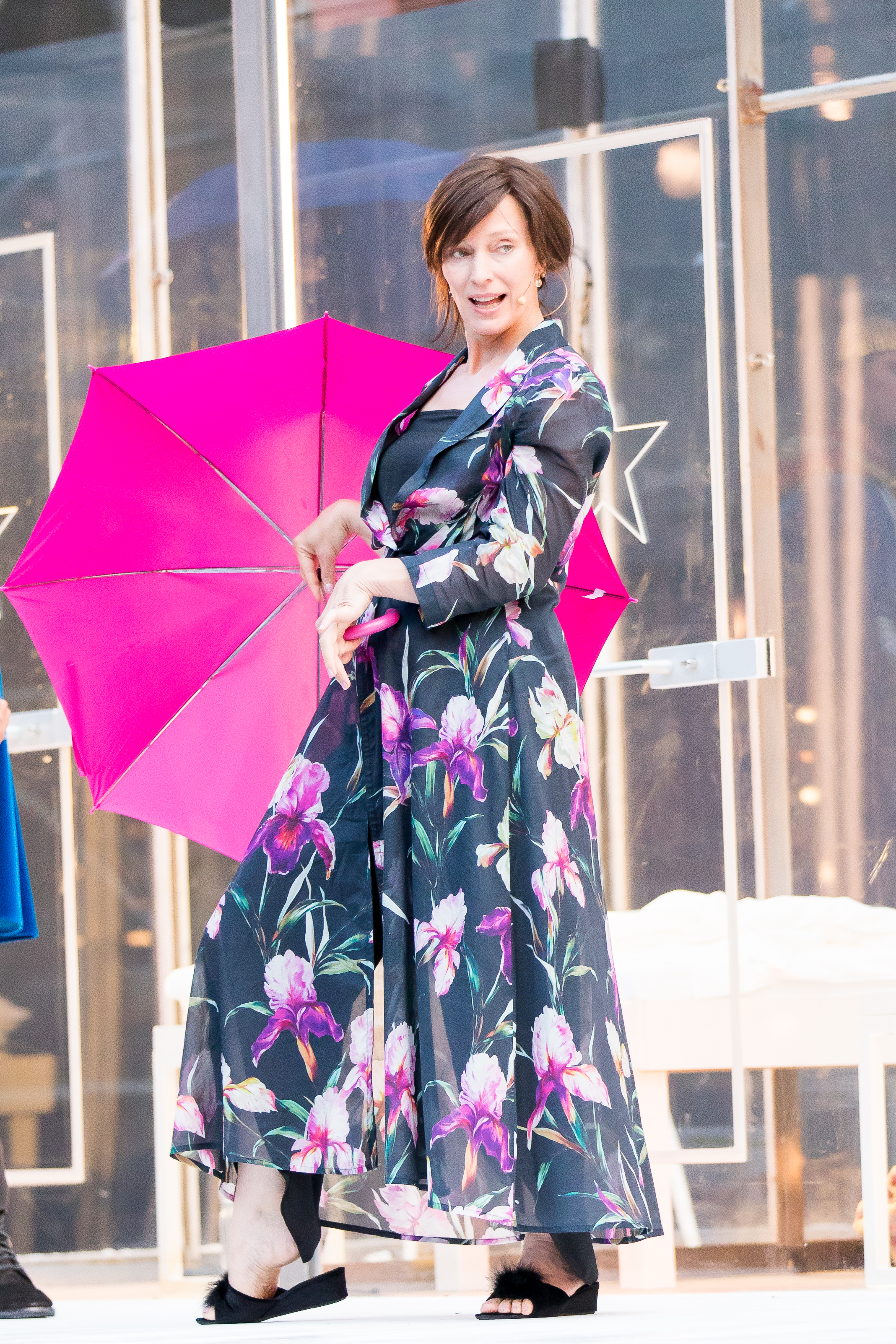 2016: Uraufführung: "GOLD. Der Film der Nibelungen" Regie: Nuran David Calis Autor: Albert Ostermaier Intendant: Nico Hofmann --- Ensemble: Produzent Konstantin Trauer: Uwe Ochsenknecht Regisseur Arsenij Kubik: Vladimir Burlakov Drehbuchautor Charlie P. Weide: Josef Ostendorf Society Reporter Peter Scheumer: Dominic Raacke Kamerafrau "the eye": Anna Rot Setdesignerin "set": Joy Maria Bai Assistentin des Produzenten Carmen: Alexandra Kamp Maskenbildnerin Sueyla Blume : Ayse Bosse die Ältere Kriemhild Karina Bergmann: Katja Weitzenböck die Jüngere Kriemhild Simone Gehel: Constanze Wächter die Ältere Brünhild Lotte Jünger: Michaela Steiger die Jüngere Brünhild Nathalie Aurun: Dennenesch Zoudé Siegfried Mohamad Söder: Ismail Deniz Hagen René Inner: Sascha Göpel Gunther Klaus Castel: Maximilian Laprell Bürgermeister Franz Koppoler: Heiner Lauterbach during Nibelungenfestspiele "GOLD. Der Film der Nibelungen" at Wormser Kaiserdom, Worms, Rheinland Pfalz, Germany on 2016-07-12, Photo: Sven Mandel